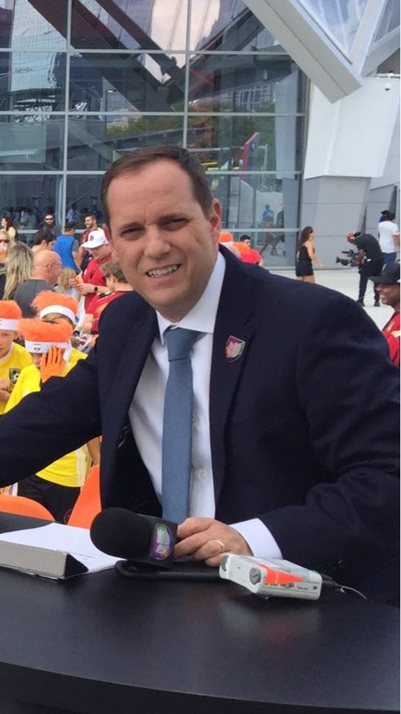 Paco Villa, Comentaristadeportivo de Univisión y Televisa